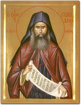 Silouan the Athonite Силуан Афонский